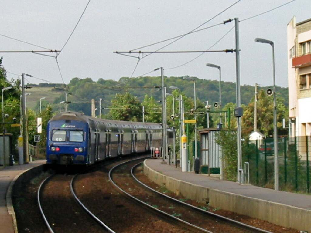 Rame à deux niveaux du Transilien quittant la gare de Maule (Yvelines) en direction de Mantes-la-Jolie.